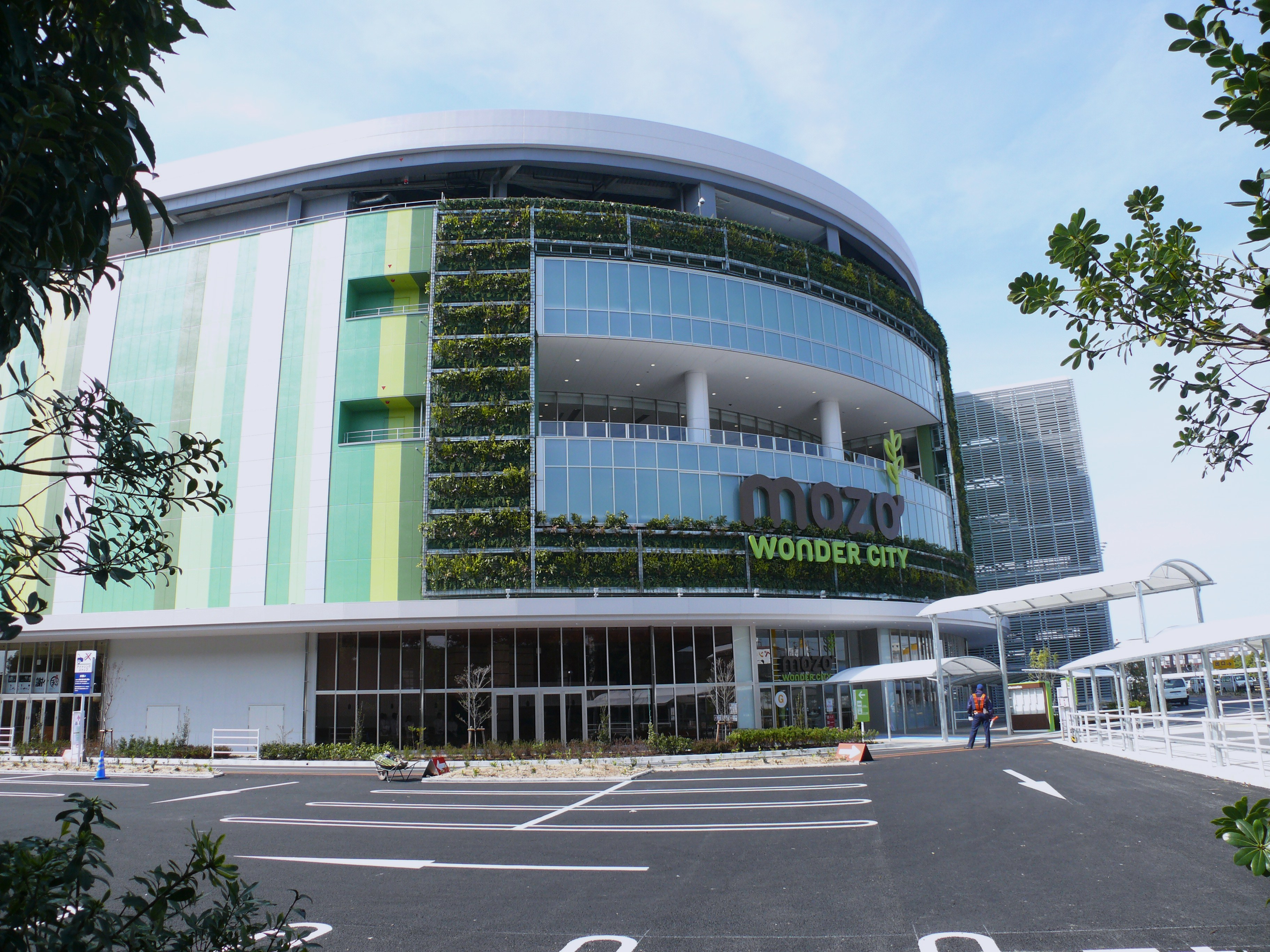 イオングループのショッピングセンター「MOZO（モゾ）ワンダーシティ（旧イオンモール名古屋ワンダーシティ」